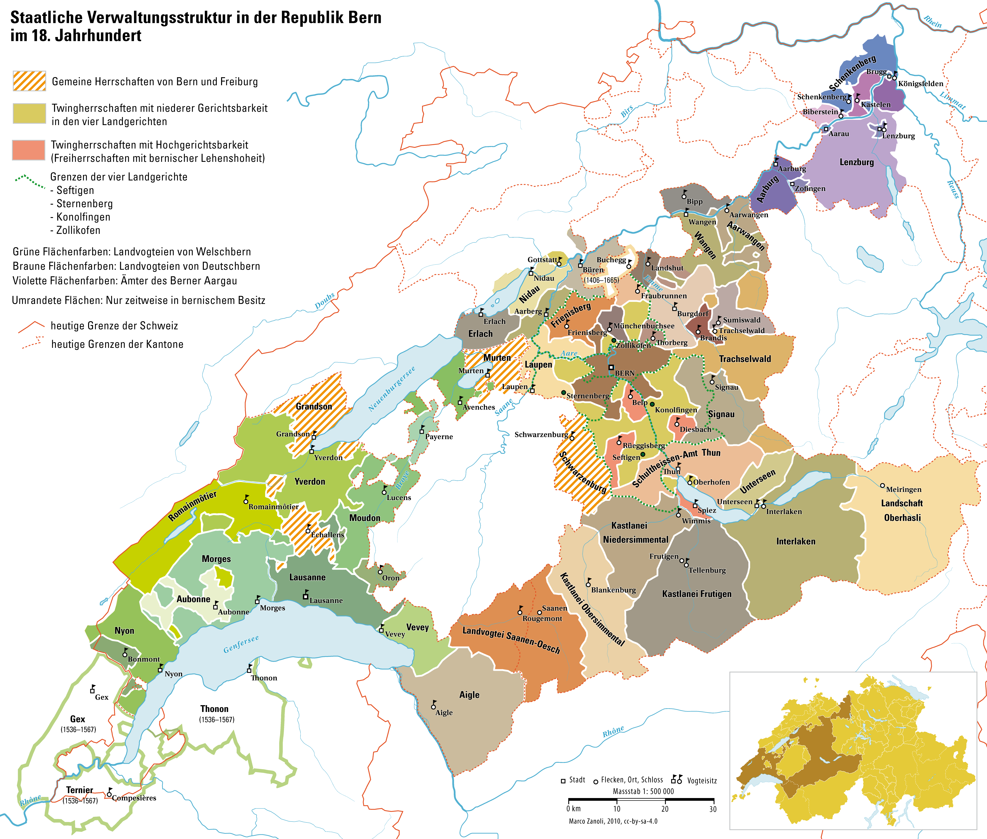 Staatliche Verwaltungsgliederung der Republik Bern im 18. Jahrhundert